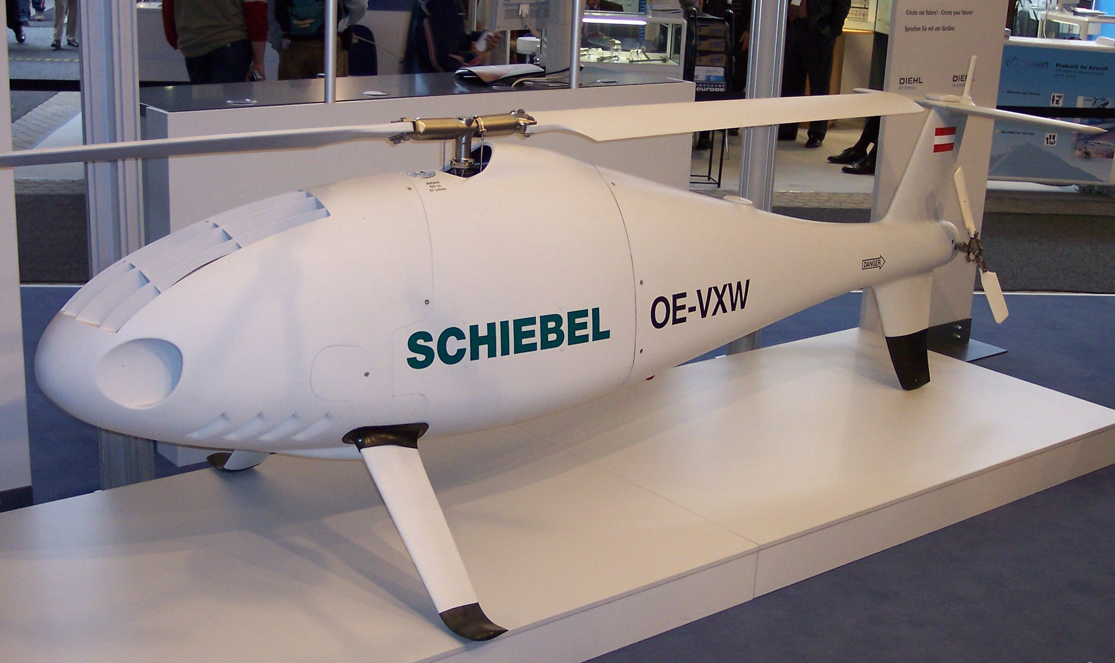 Schiebel Camcopter S-100, taken during ILA 2006.